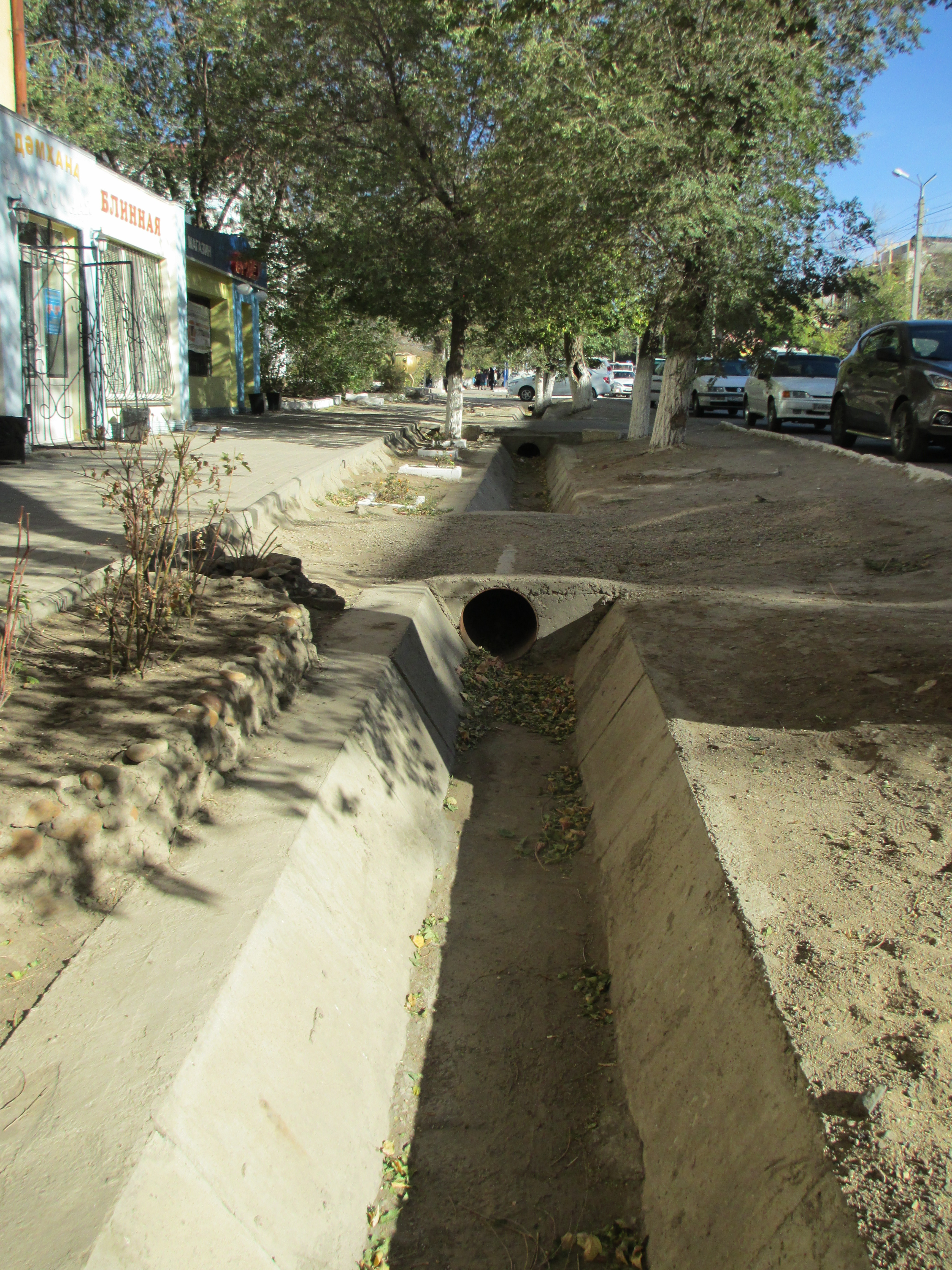 Ливневая канализация в Актобе